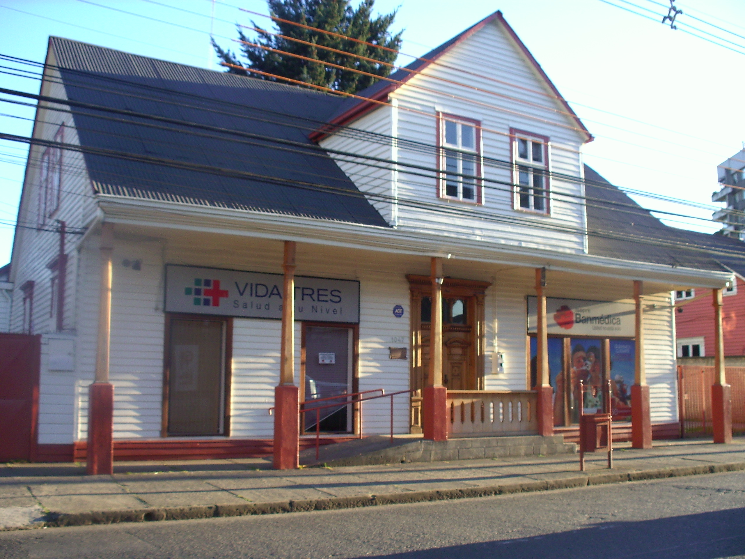 Casa de Germán Stückrath This is a photo of a national monument in Chile: 716